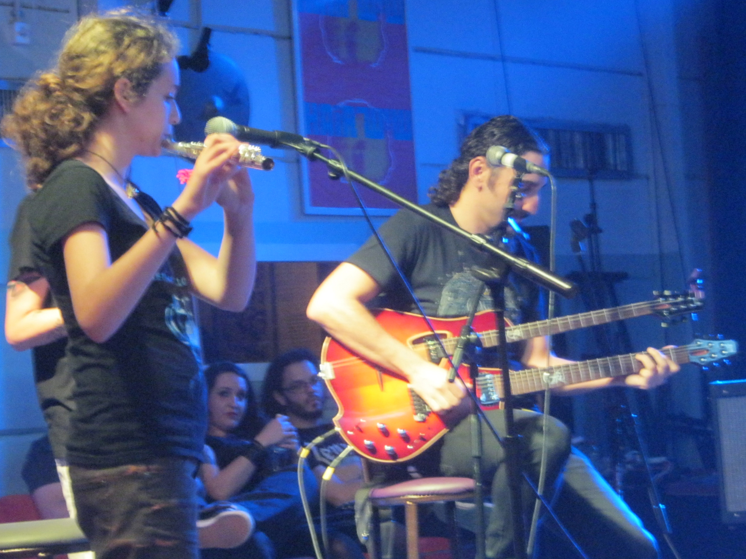 Yossi Sassi and his daughter